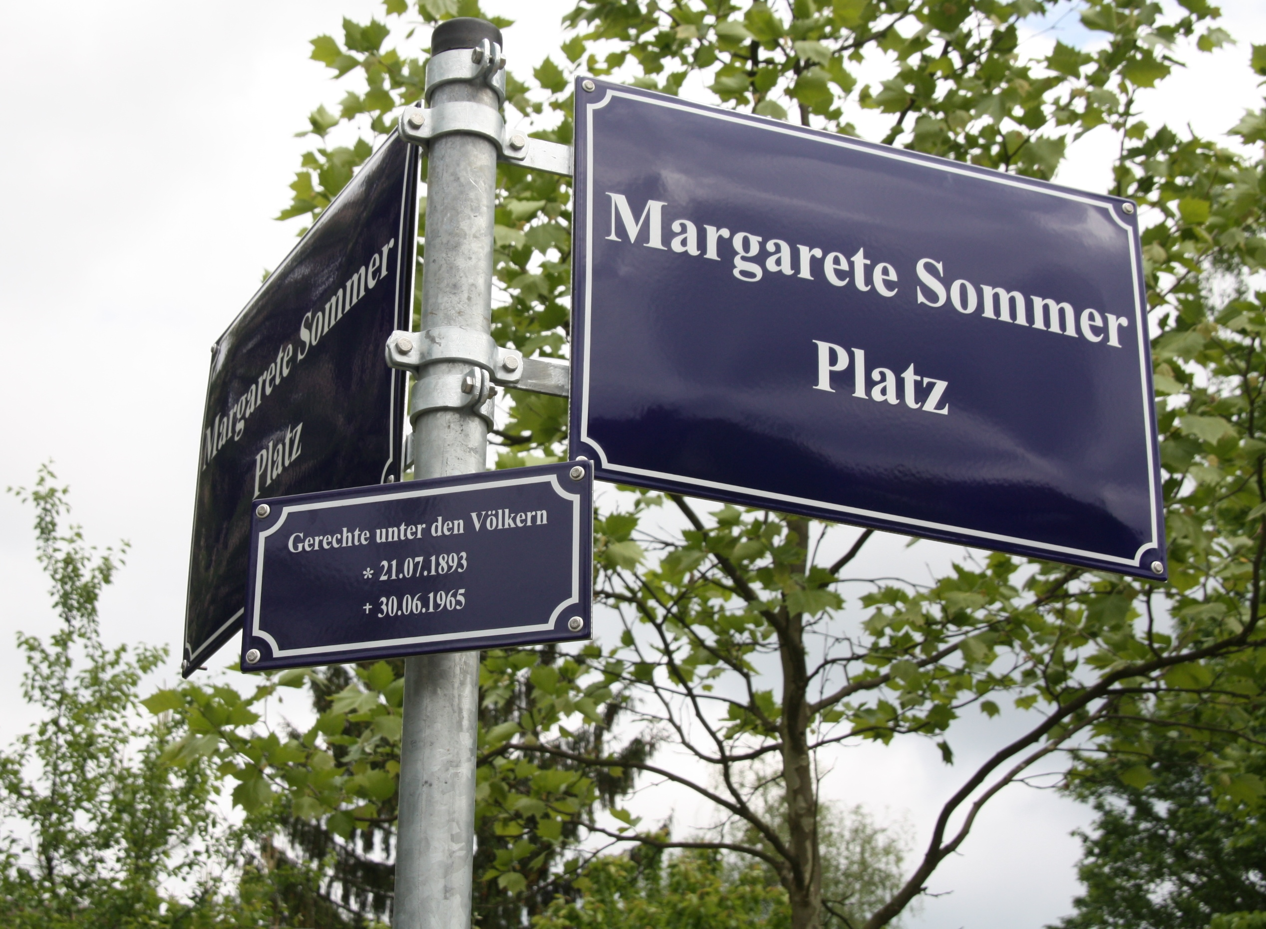 Schild des Margarete-Sommer-Platzes an der Einmündung der Förster-Funke-Allee in die Hohe Kiefer in Kleinmachnow am Tag der Benennung, 8. Mai 2014